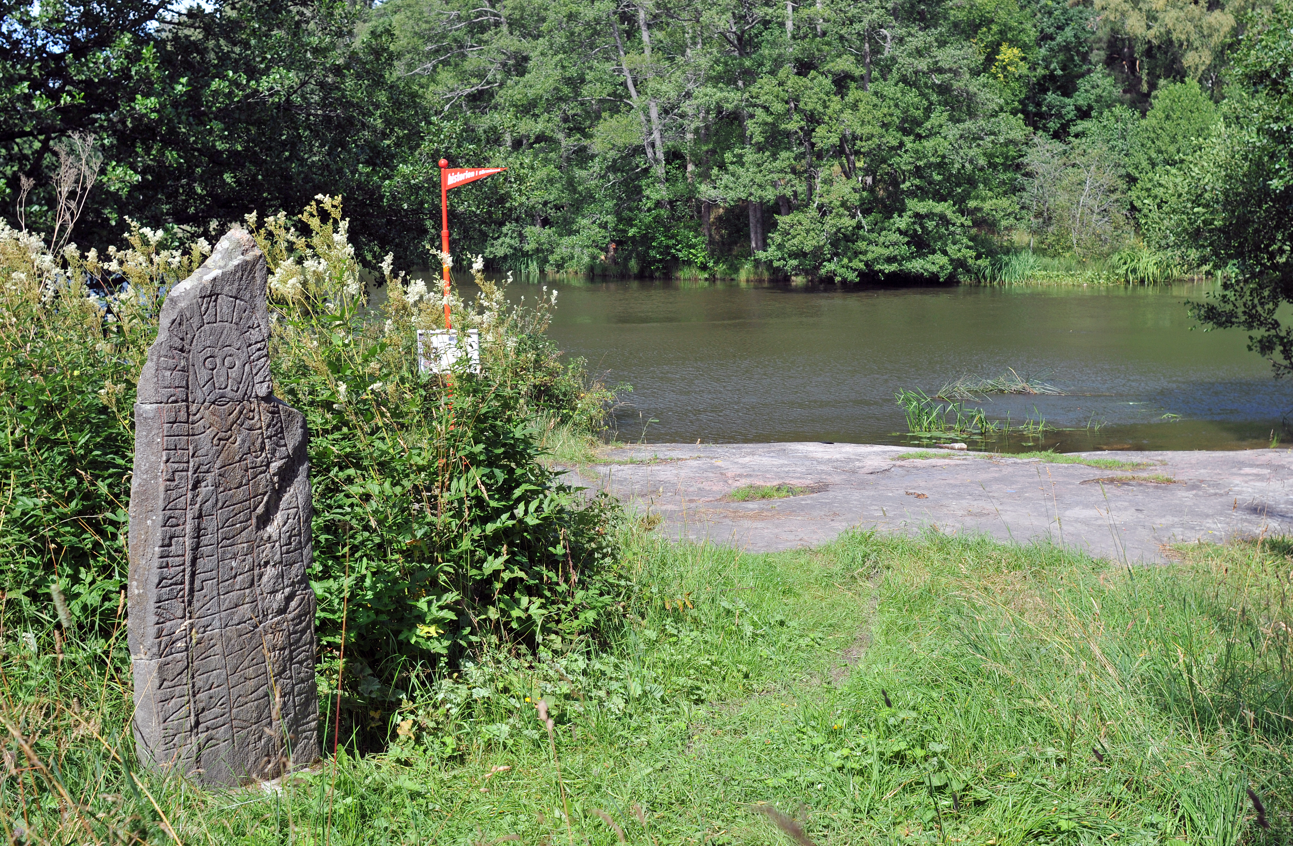 Stenbro vägbank över Nyköpingsån och runstenen Sö 367 vid Oppeby i Nyköpings kommun.